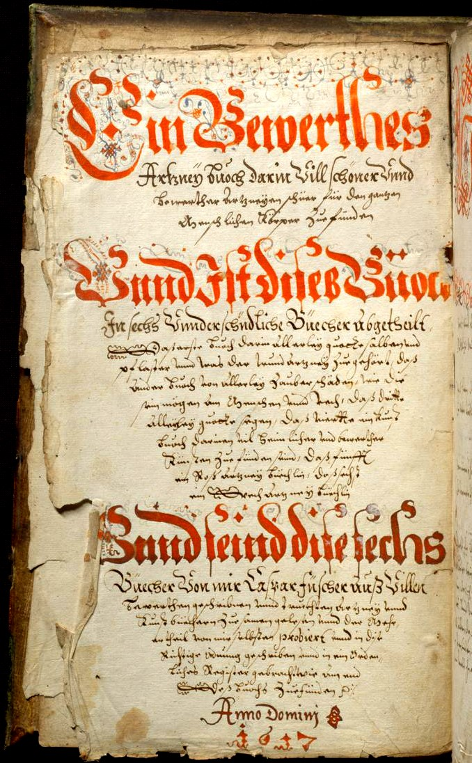 Innentitel des Arzneibuches von Caspar Fischer